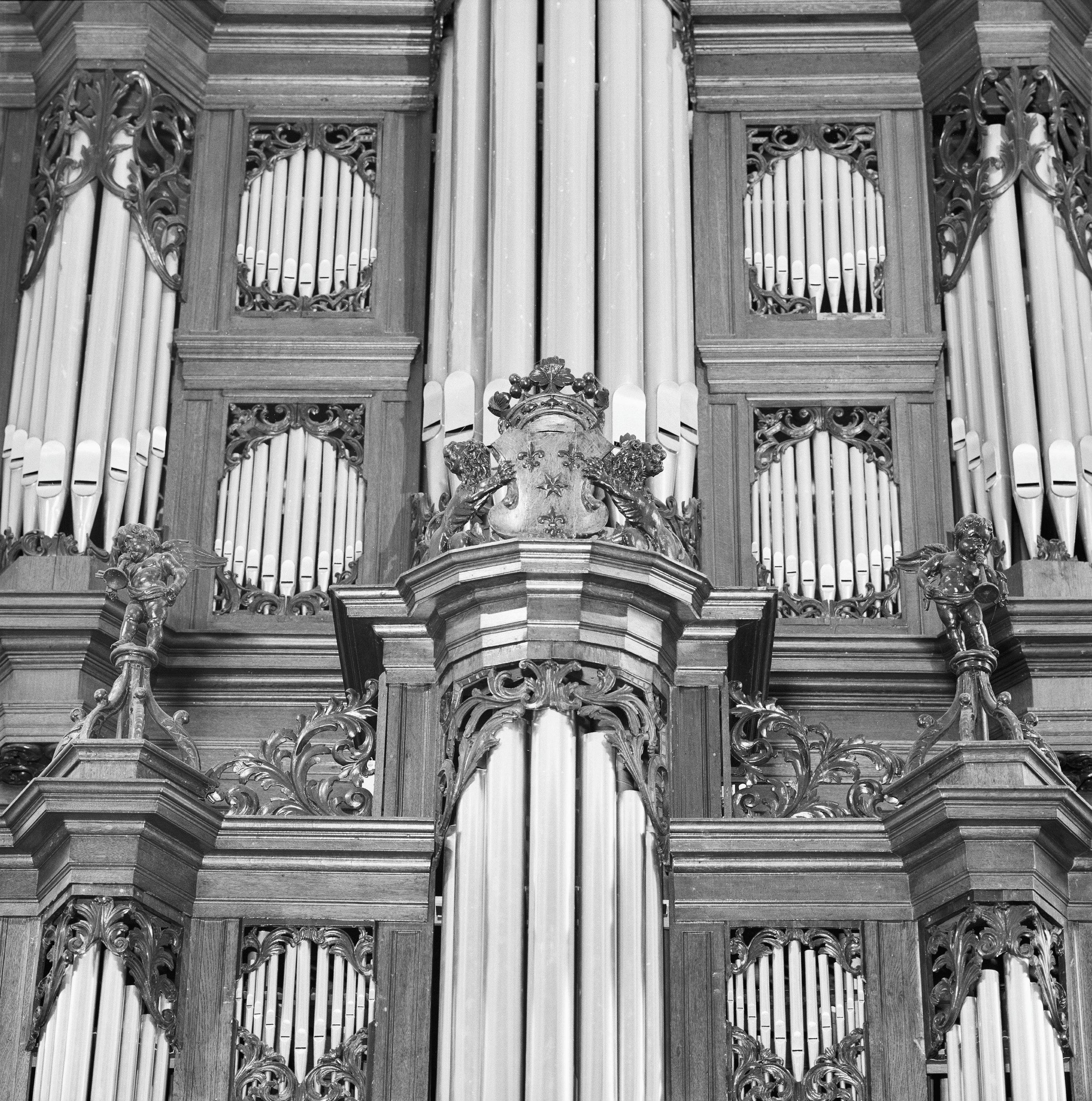 Nederlands Hervormde Kerk: INTERIEUR, ORGEL, DETAIL